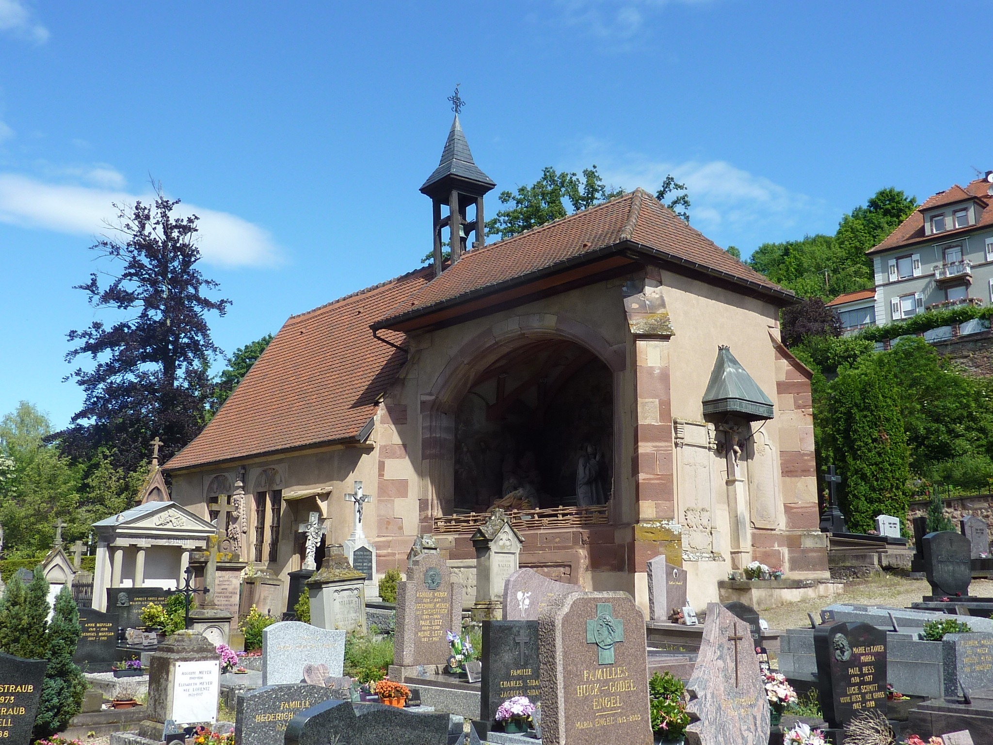 Chapelle du Cimetière d'Obernai